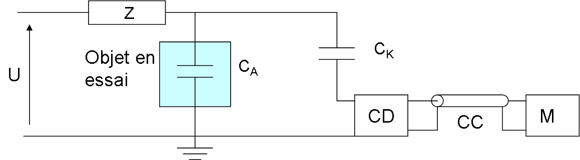 Montage 1a pour la mesure de décharge partiel d'après norme CEI